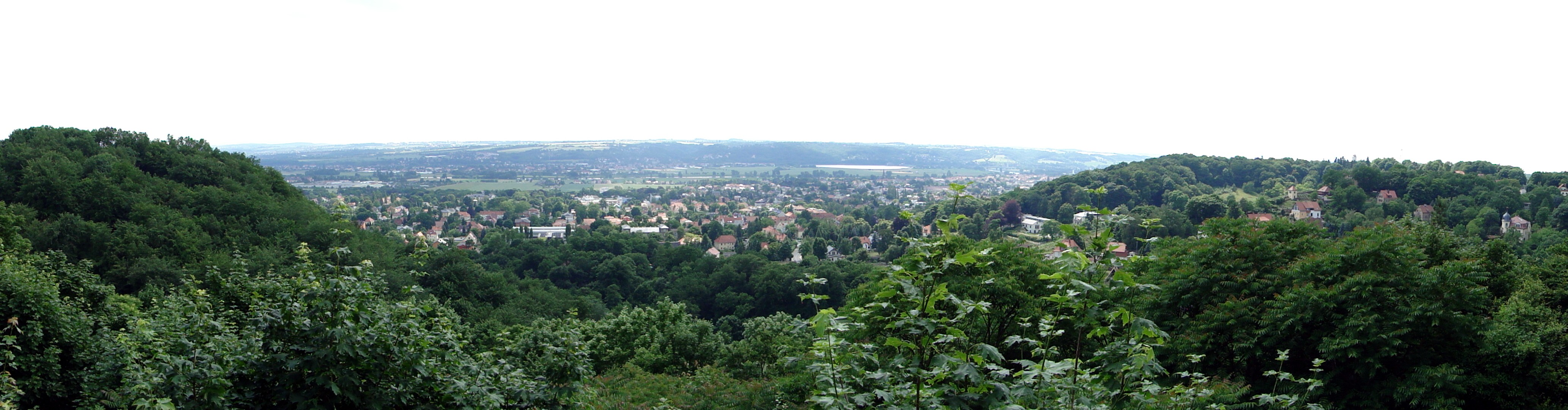 Panoramablick von Aussichtspunkt Pfeifferweg auf Radebeul (Kötzschenbroda und Niederlößnitz)